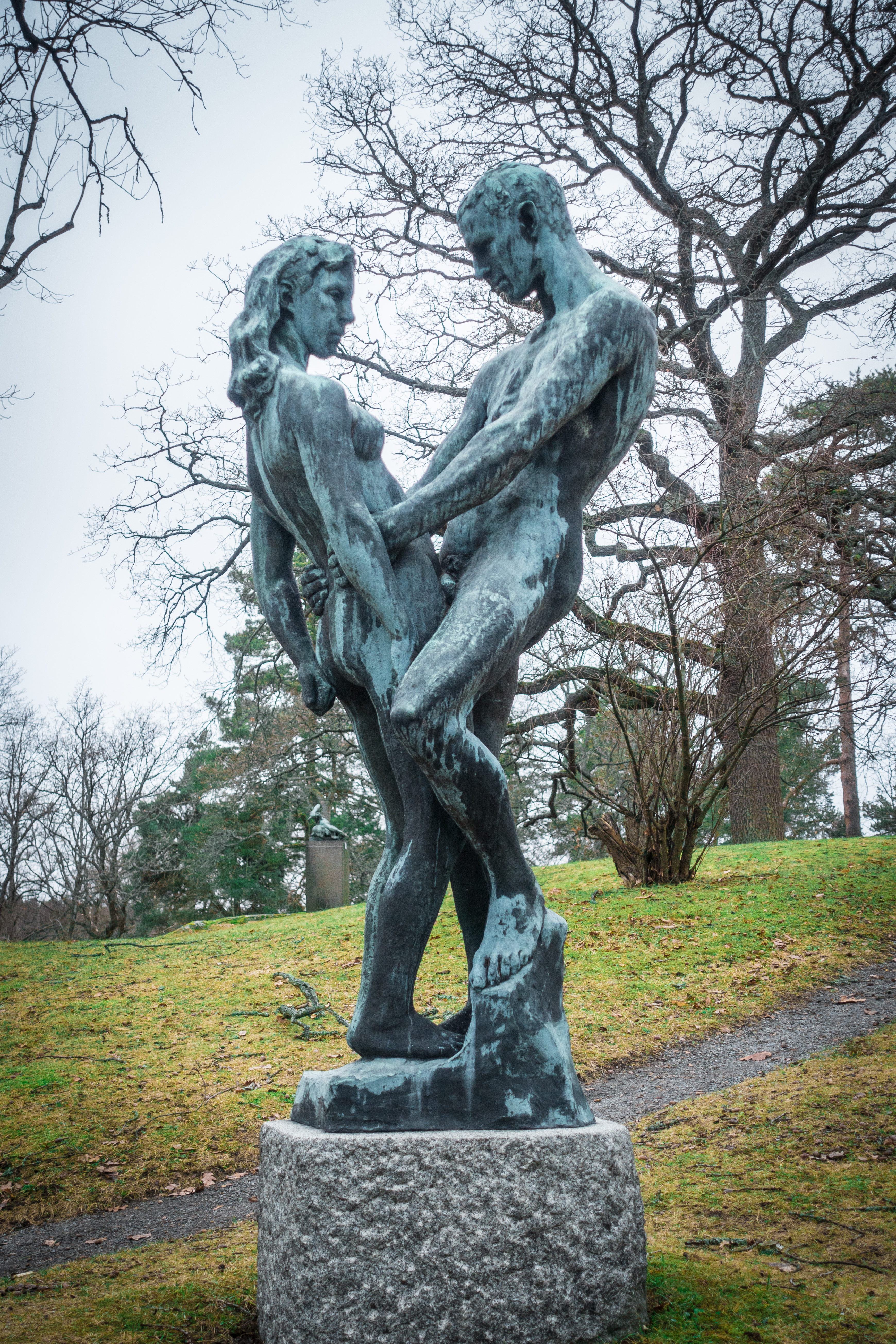 "Man och kvinna" av Gustav Vigeland i Thielska galleriets trädgårdspark i Stockholm.